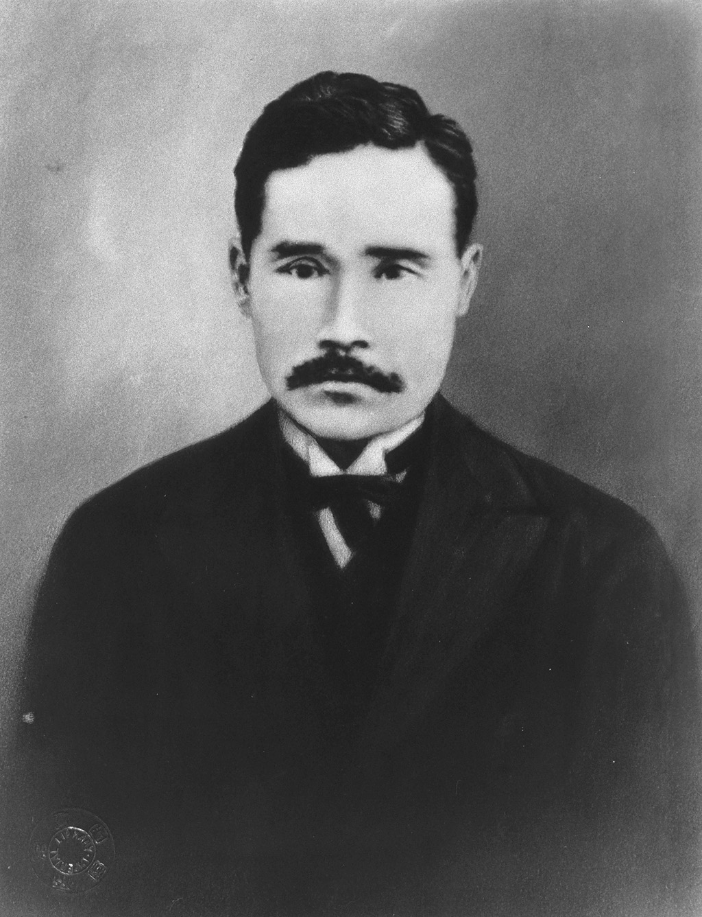 Portrait of Nakajima Nobuyuki (中島信行, 1846 – 1899)